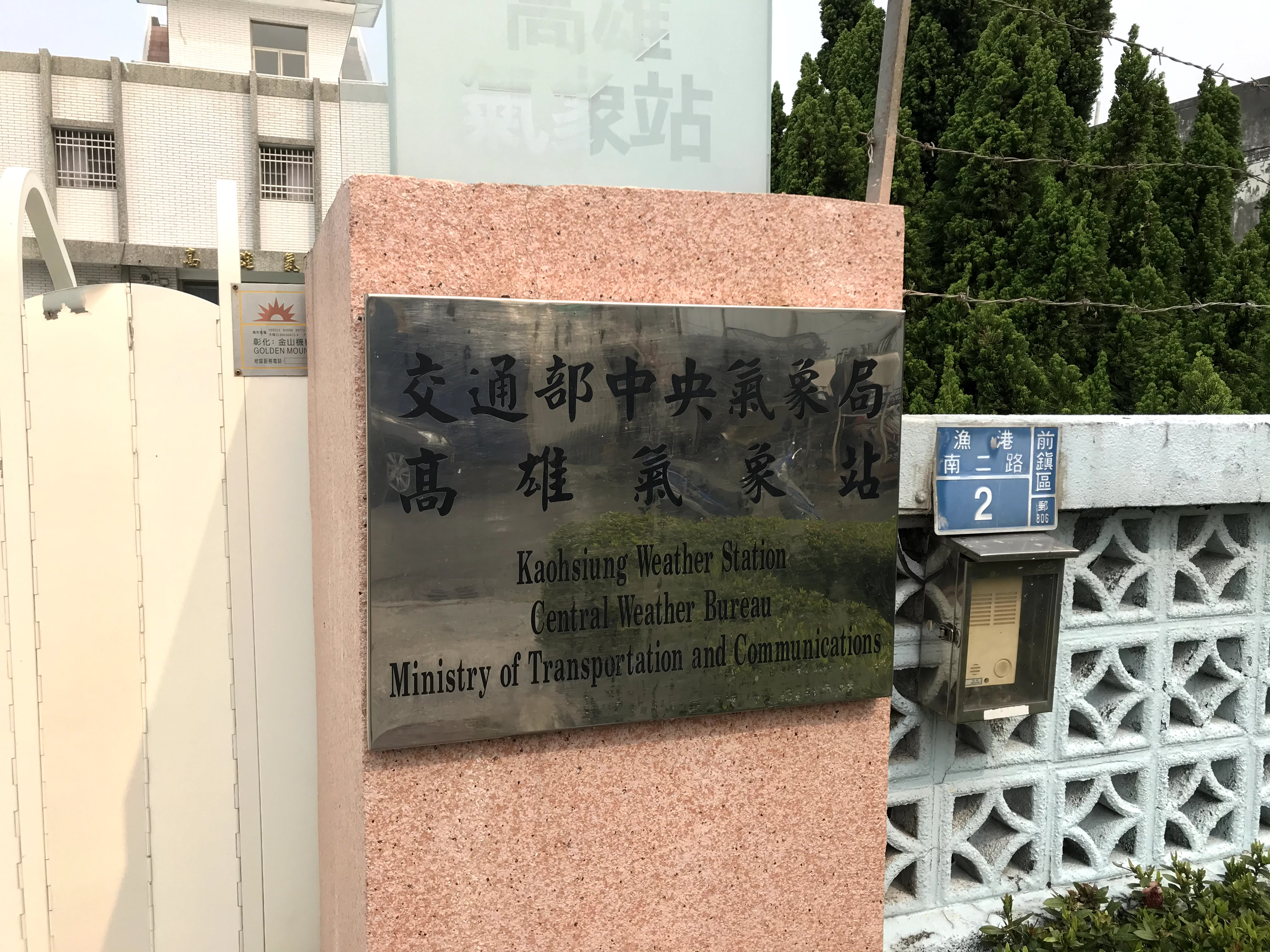 中文（台灣）: 交通部中央氣象局高雄氣象站門牌